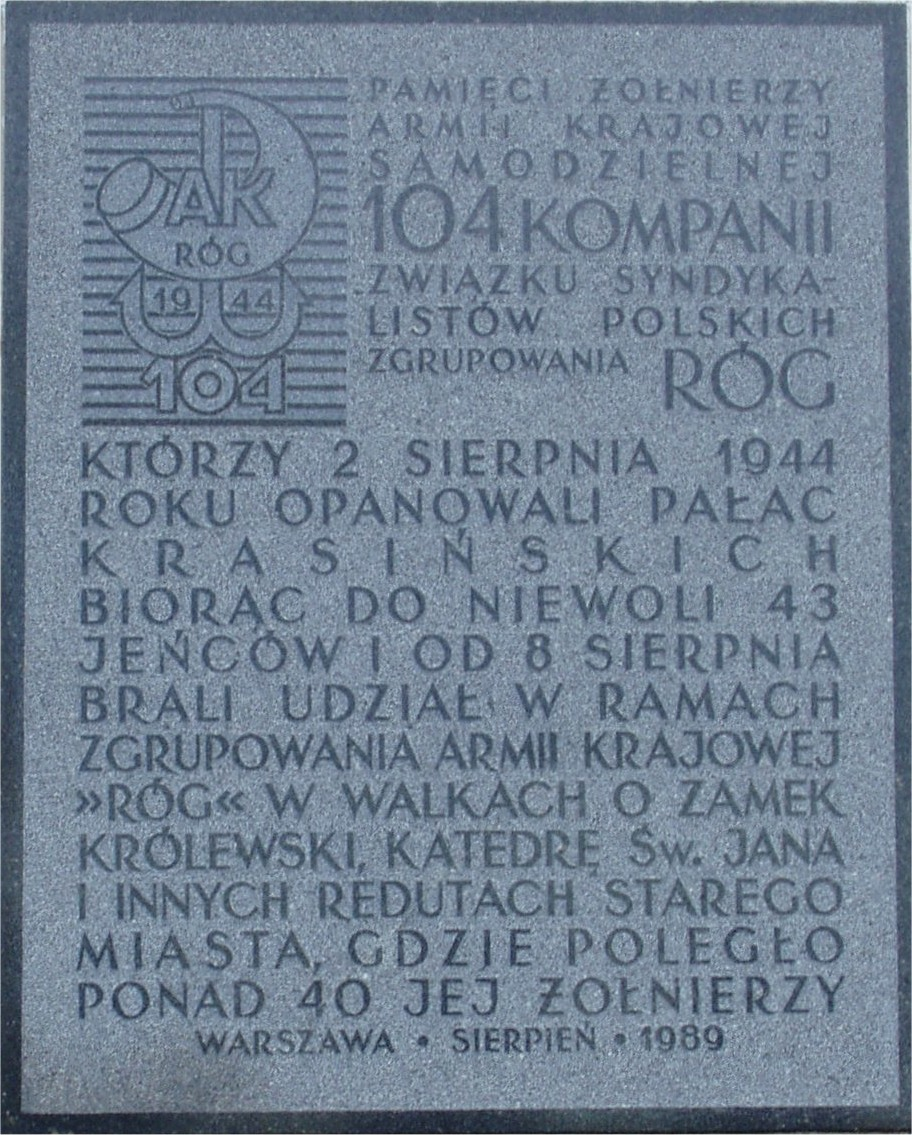 Na ścianie Pałacu Krasińskich przy placu Krasińskich w Warszawie (fot Zu)